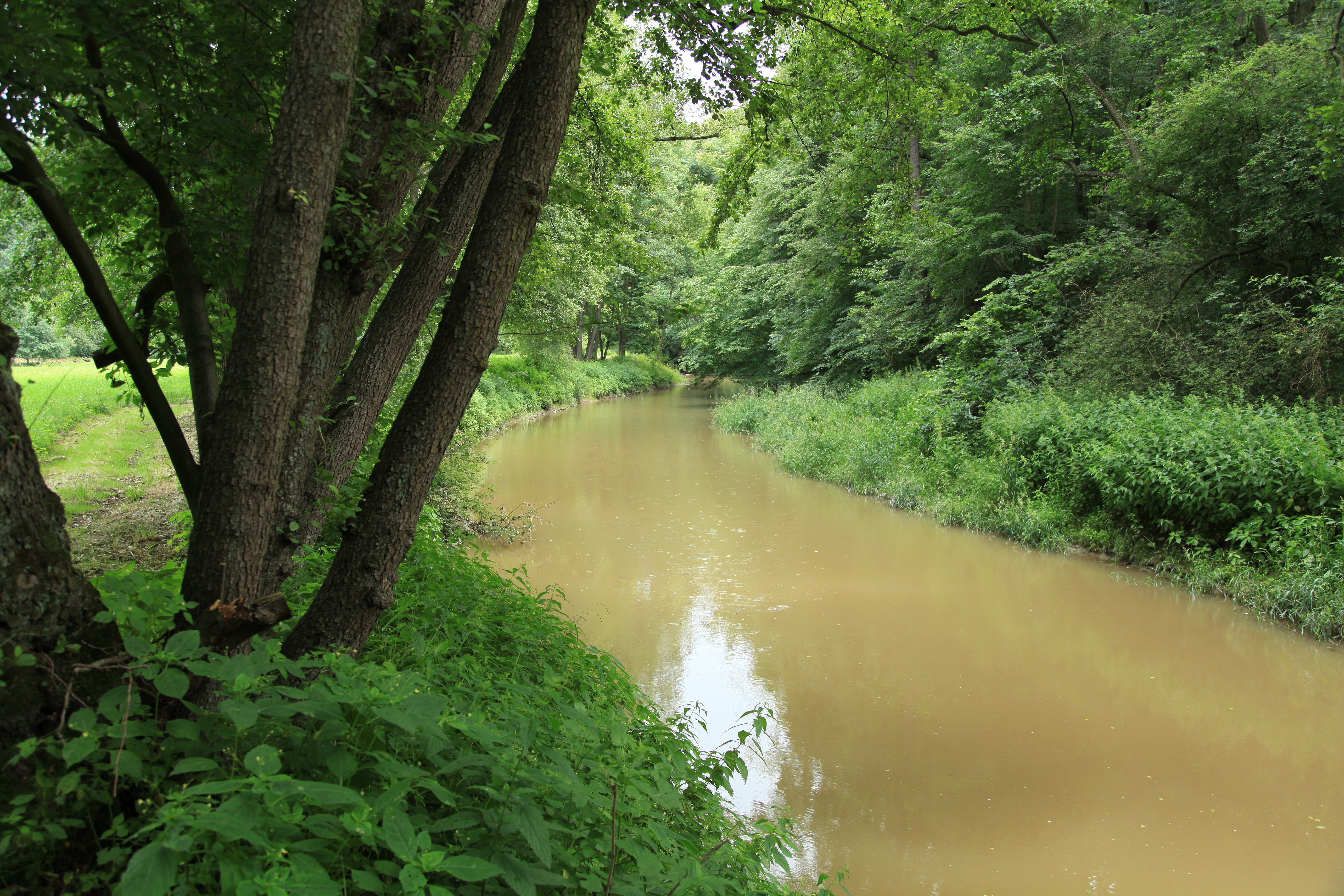 Gröditzer Skala hinter/unter dem Schloss, Gröditz in Weißenberg